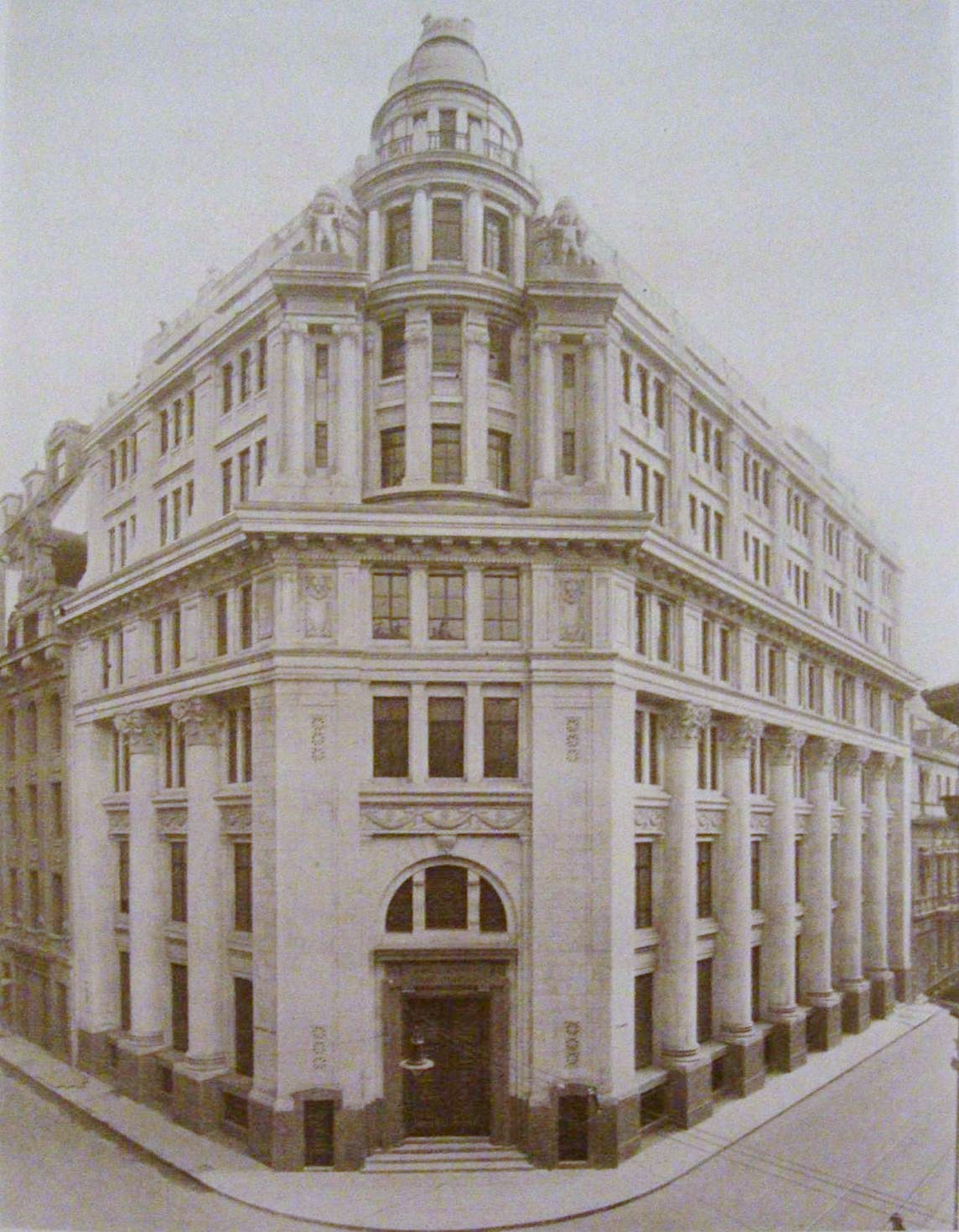 Frente del nuevo edificio del Banco Alemán Transatlántico, ubicado en la esquina noroeste de las calles Bartolomé Mitre y Reconquista. Proyectado por el arquitecto Ernesto Sackmann y terminado en 1926. Barrio de San Nicolás, ciudad de Buenos Aires, Argentina.